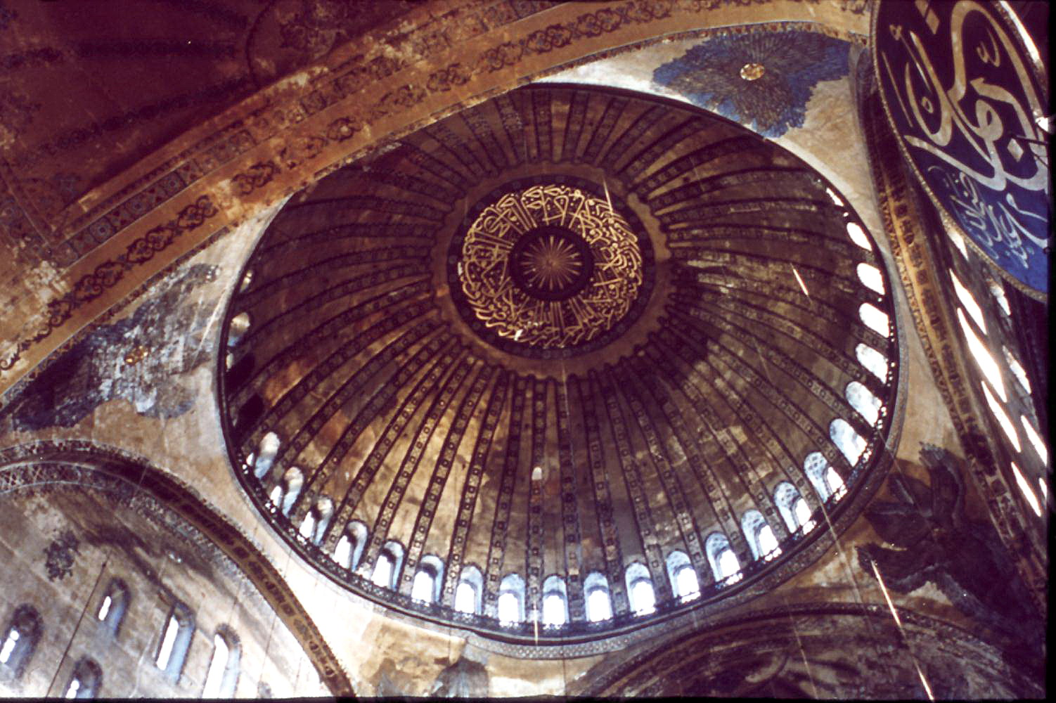 Sainte-Sophie (Istanbul)